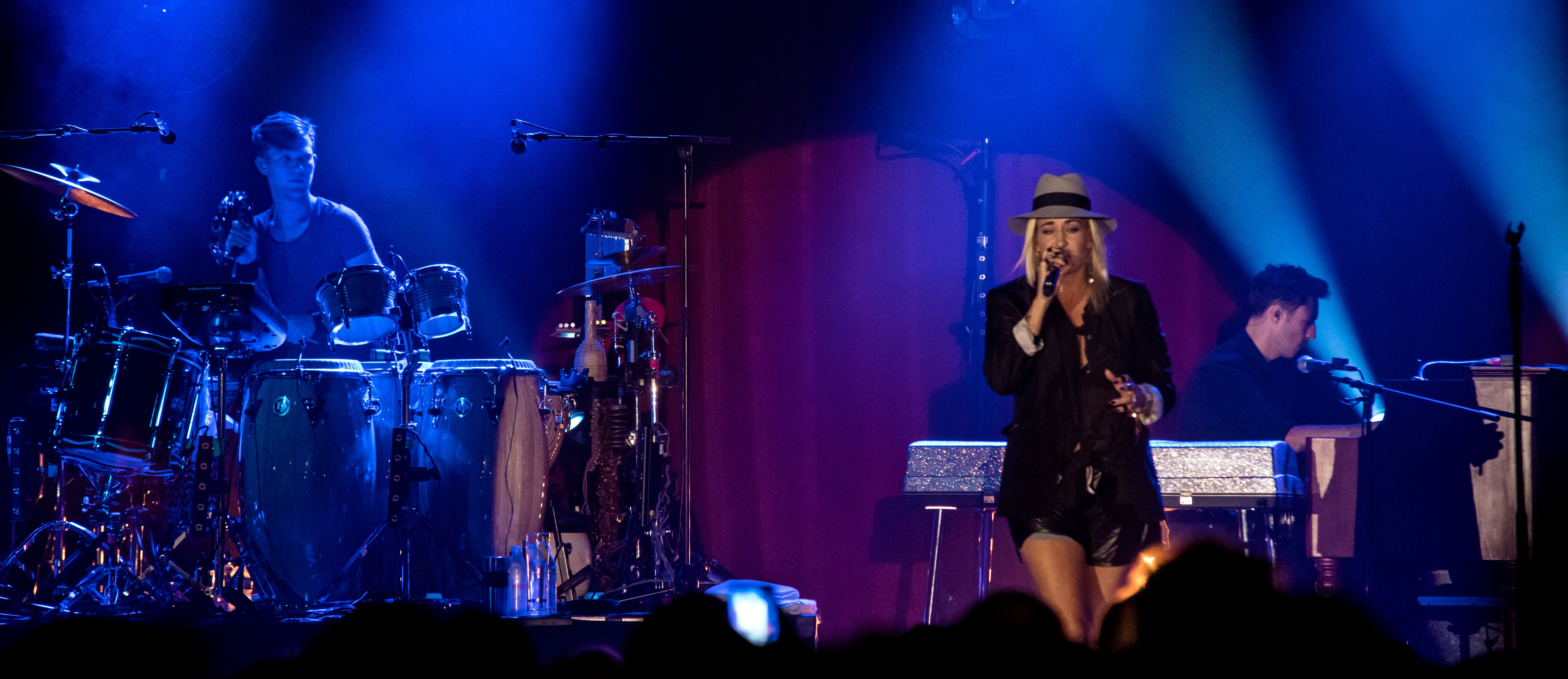 Bilder vom Zelt Musik Festival 2016 in Freiburg im Breisgau Sarah Connor